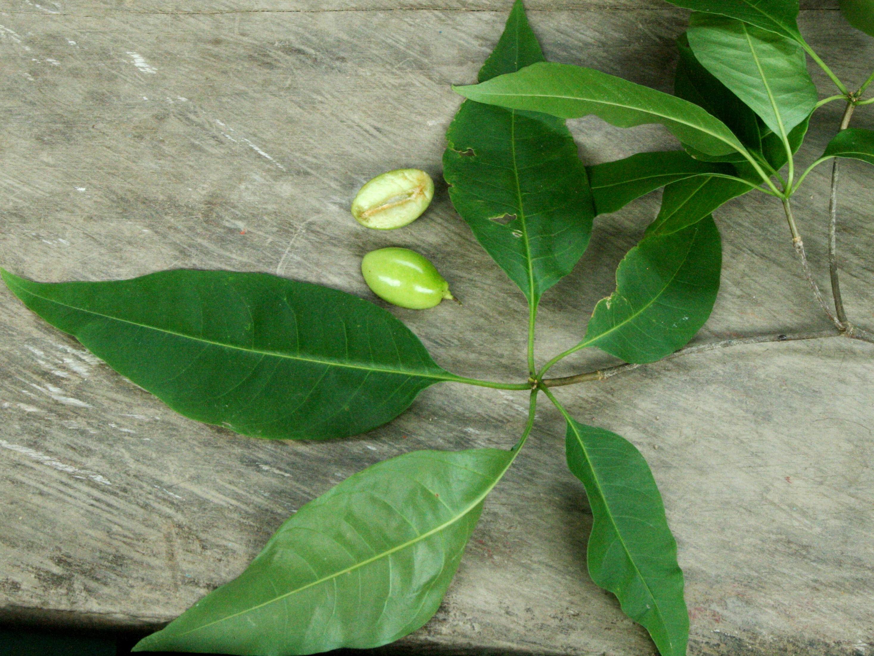 Větévka Rauvolfia polyphylla, Rio Ventuari, Venezuela